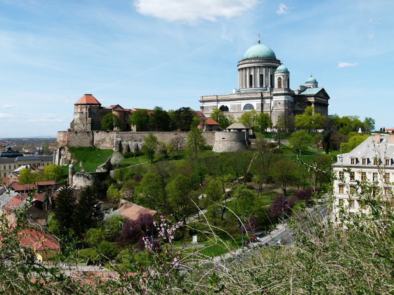 Főszékesegyház (Esztergom, Szent István tér) This is a photo of a monument in Hungary, Identifier: 6238